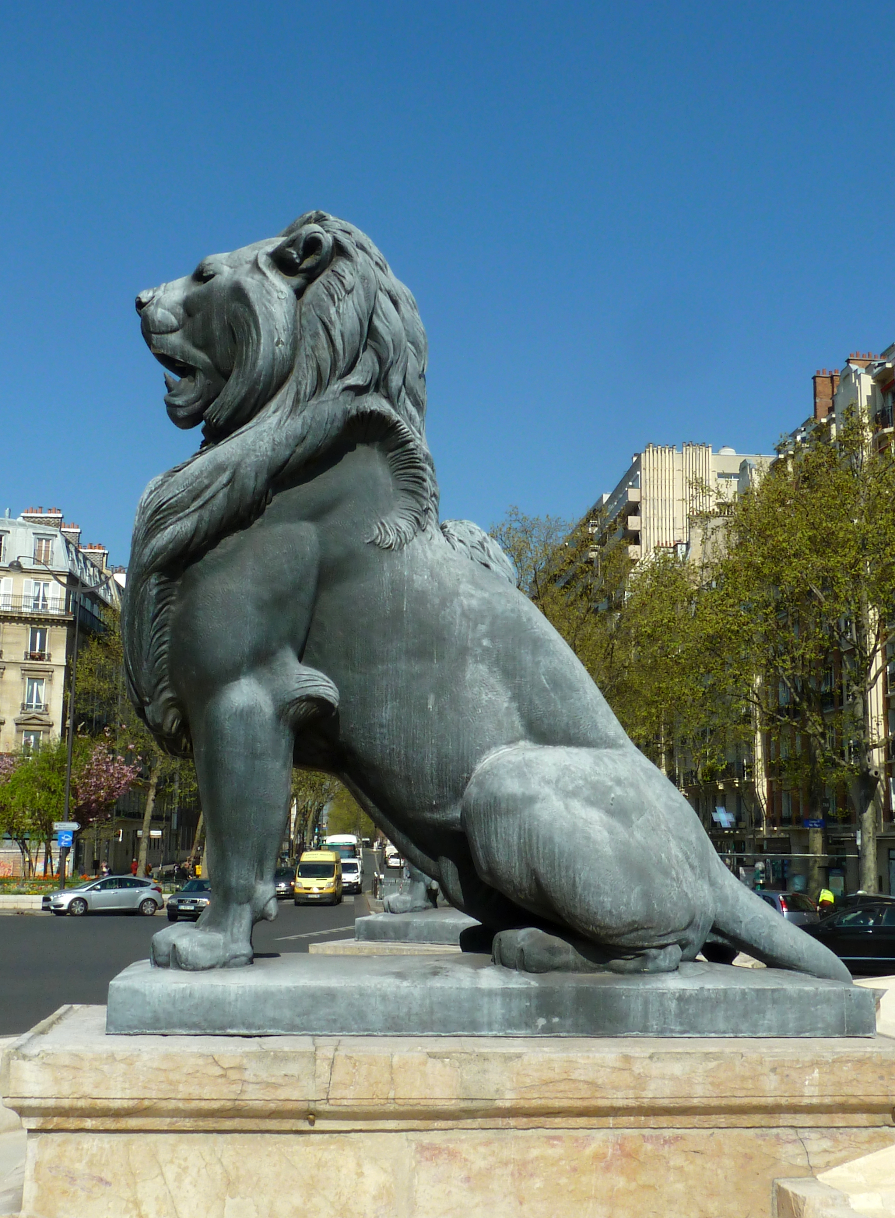 Fontaine du Château d'Eau (Paris, 12e arrond) un des 8 lions de Henri-Alfred Jacquemart.